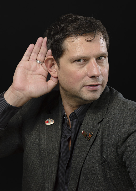 Richard Dubugnon, compositeur, né à Lausanne en 1968. Portrait réalisé à la BCU Lausanne, le 4 mars 2015.